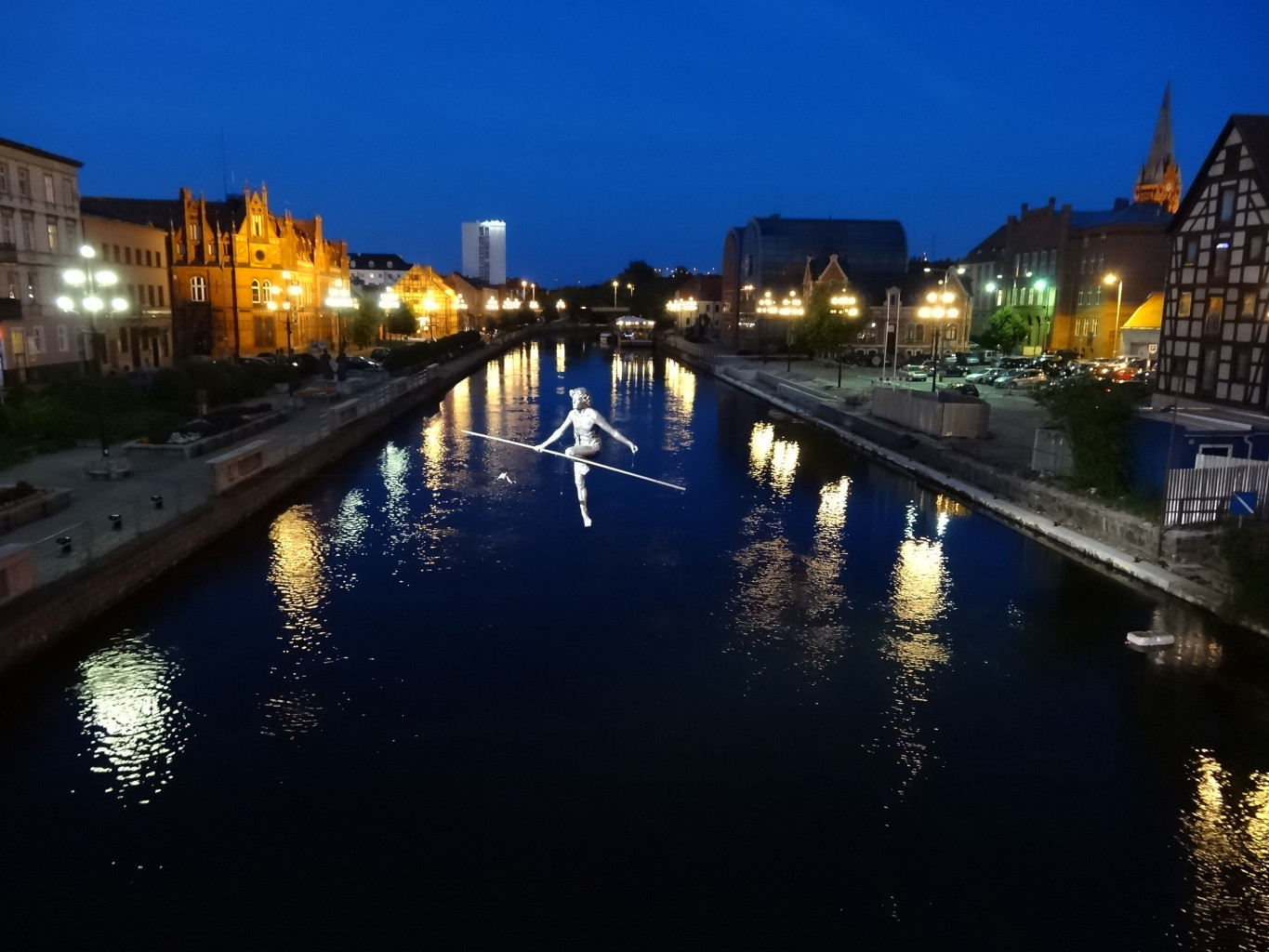 Widok z mostu Staromiejskiego im. Jerzego Sulimy-Kamińskiego w Bydgoszczy